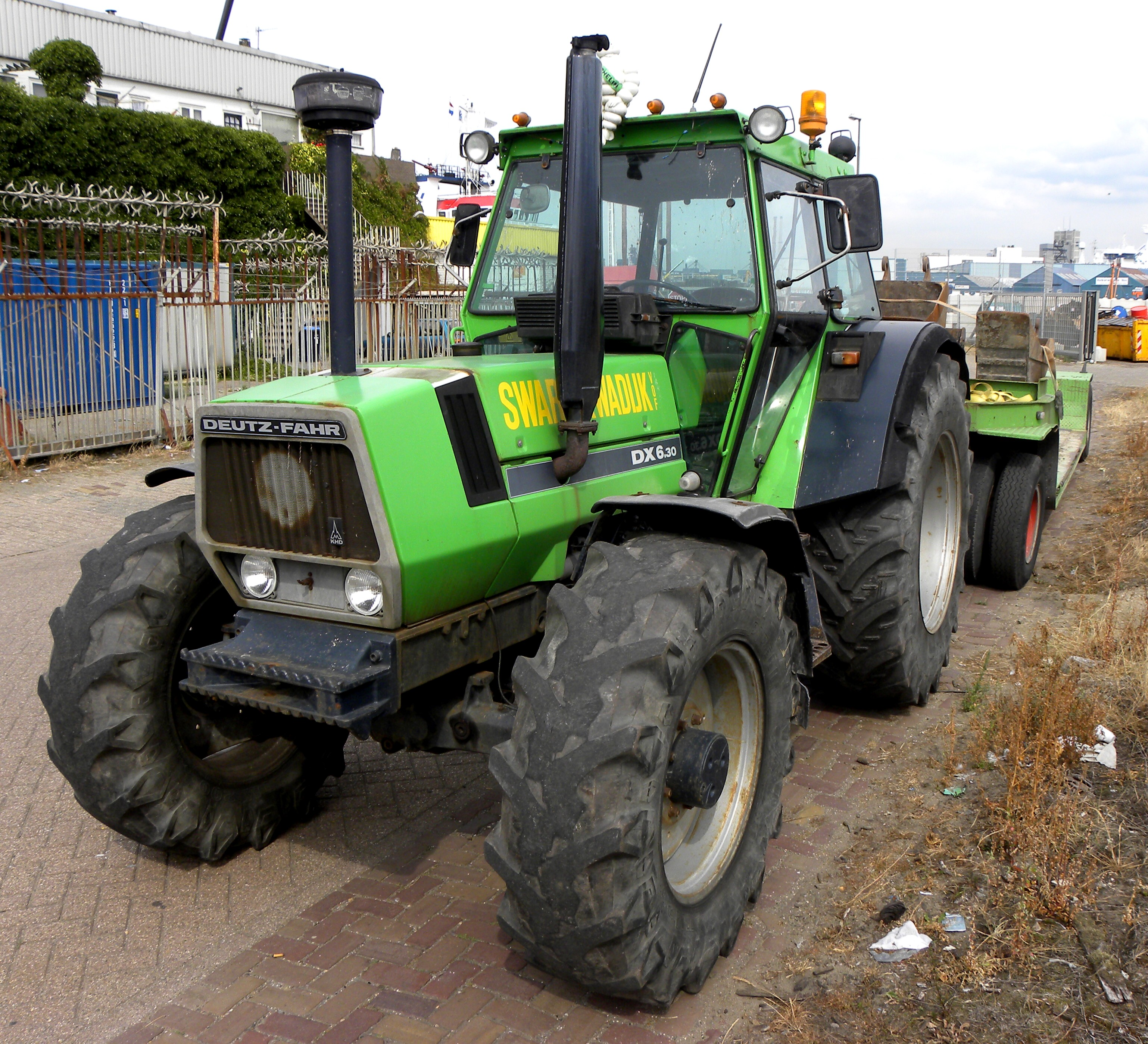 Deutz-Fahr DX 6.30 – Swart Kwadijk VOF Machineverhuur Tuingrond & Zand